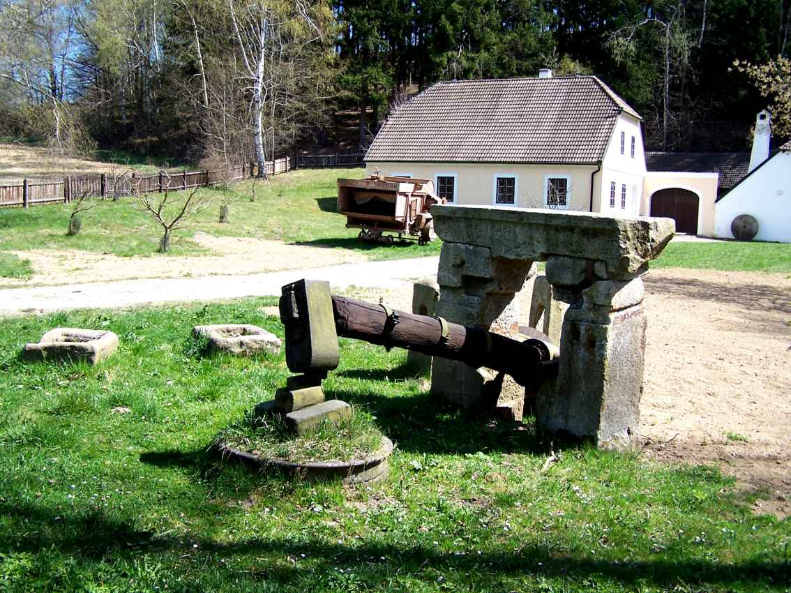 Buškův hamr u Trhových Svin